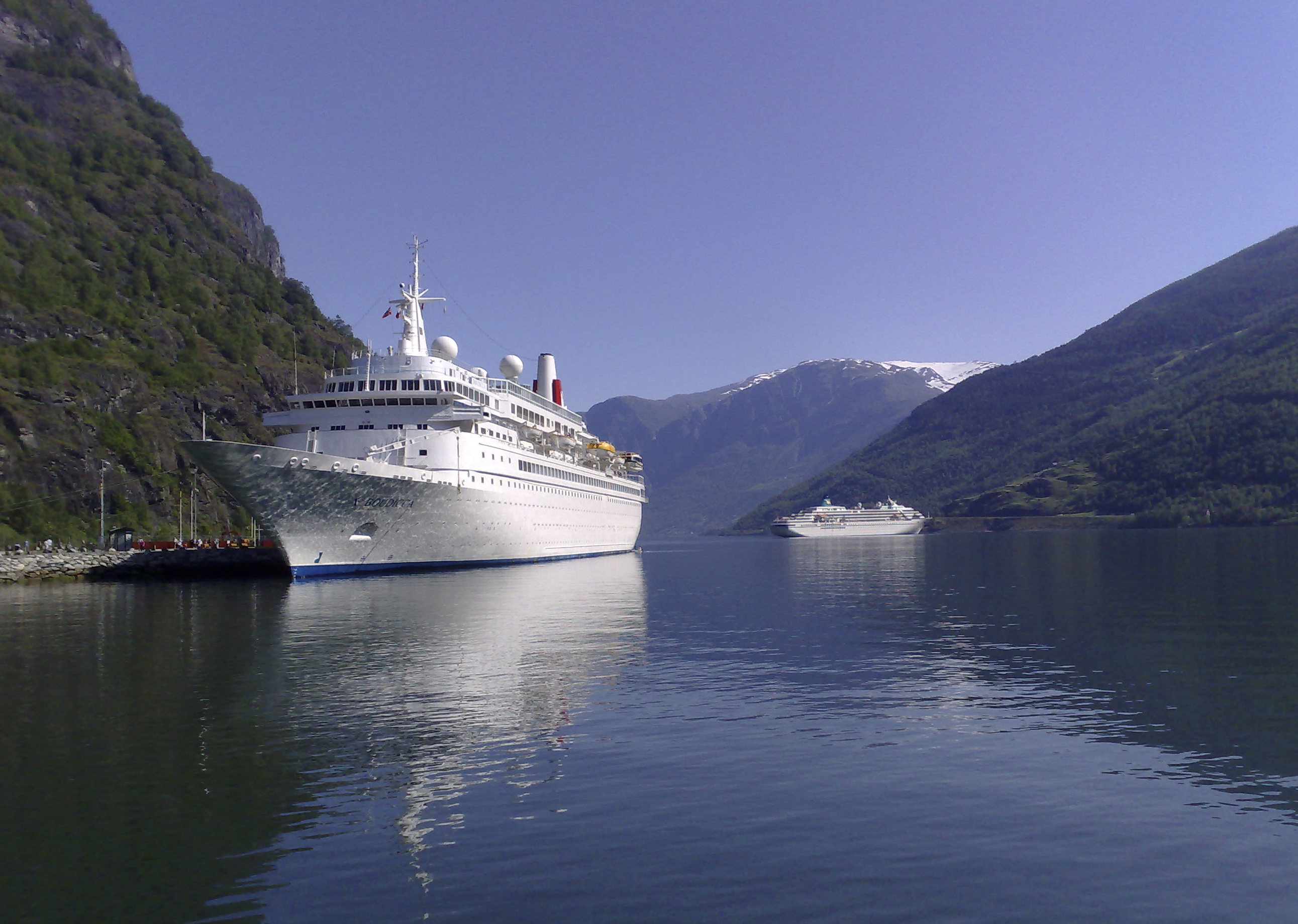 Flåm inst i Aurlandsfjorden er ei av det travlaste cruisehamnene i Noreg.